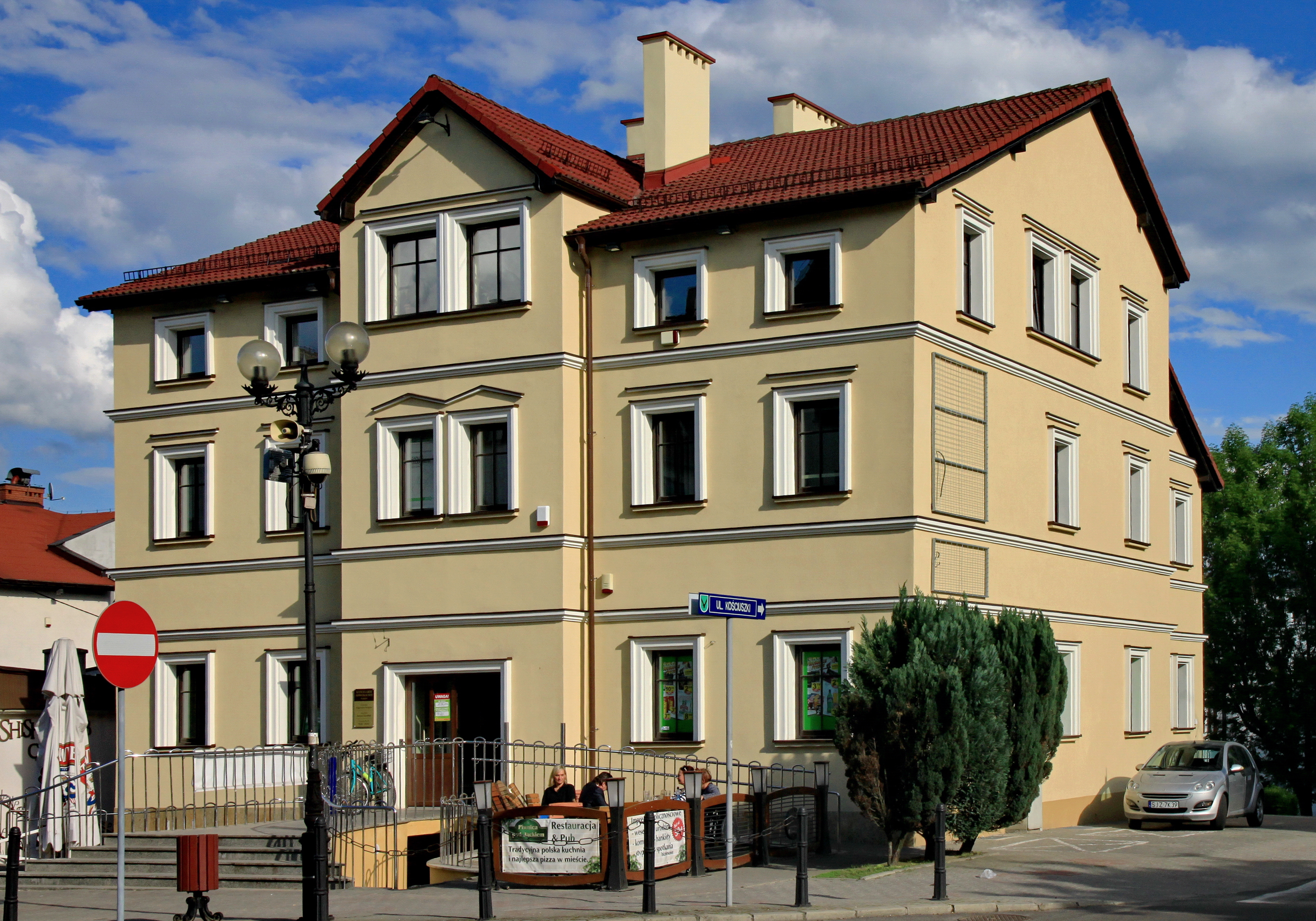 Budynek wybudowany w Jastrzębiu-Zdroju w 1890 roku. Przed II wojną światową główny ośrodek życia żydowskiego w Jastrzębiu-Zdroju, mieszczący sanatorium dla dzieci żydowskich, synagogę oraz biuro rabina Wilhelma Münza. Po podziale Górnego Śląska gmina żydowska sprzedała nieruchomość Fundacji NMP, która przemianowała budynek na „Dom św. Jacka”. W okresie PRL-u obiekt służył jako mieszkania pracownicze. W 1996 obiekt został wyremontowany przez prywatnego inwestora i od tego czasu służy jako budynek użyteczności publicznej.